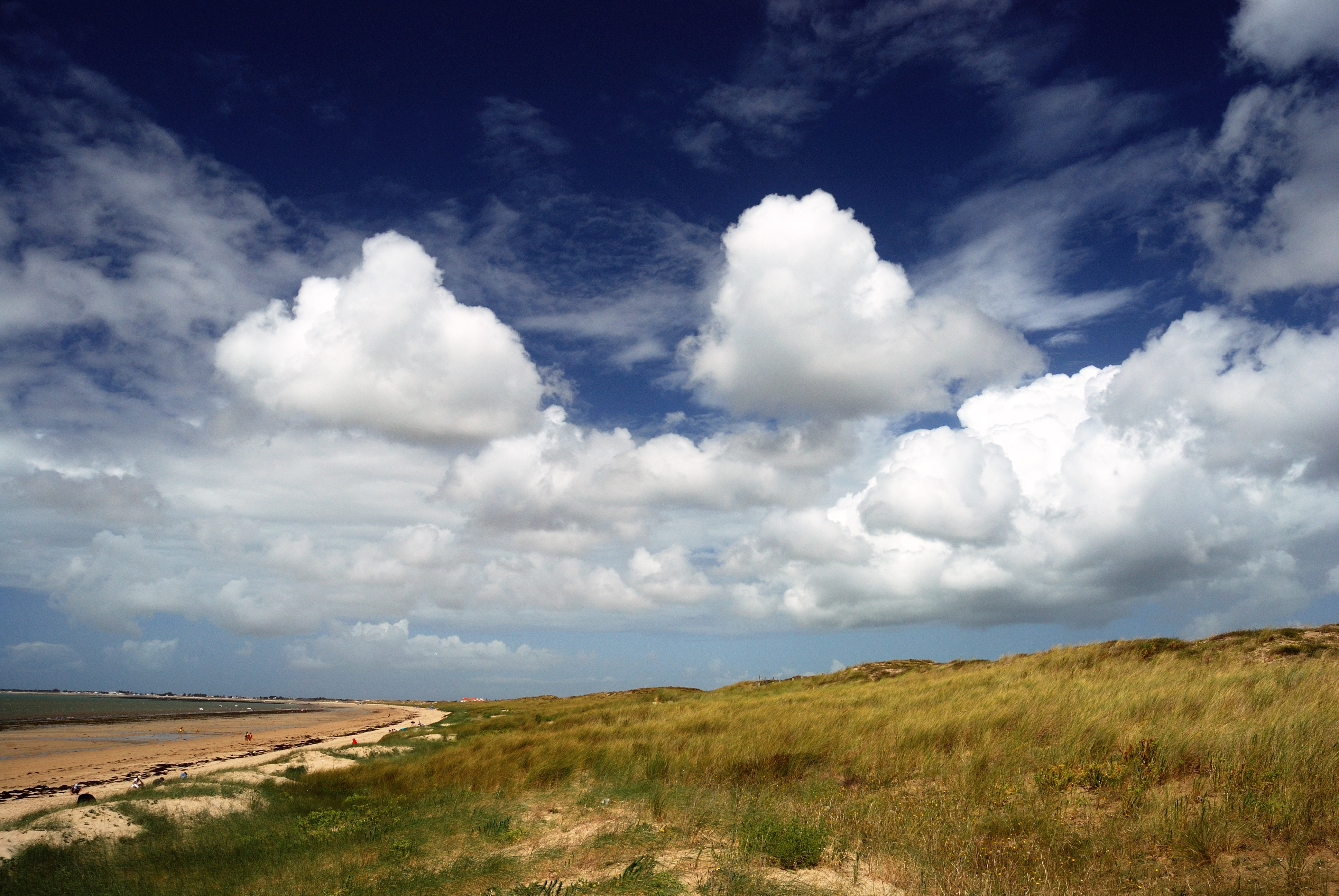 Saint-Jean-de-Monts (Vendée, Pays de la Loire, France) : Dunes côtières.